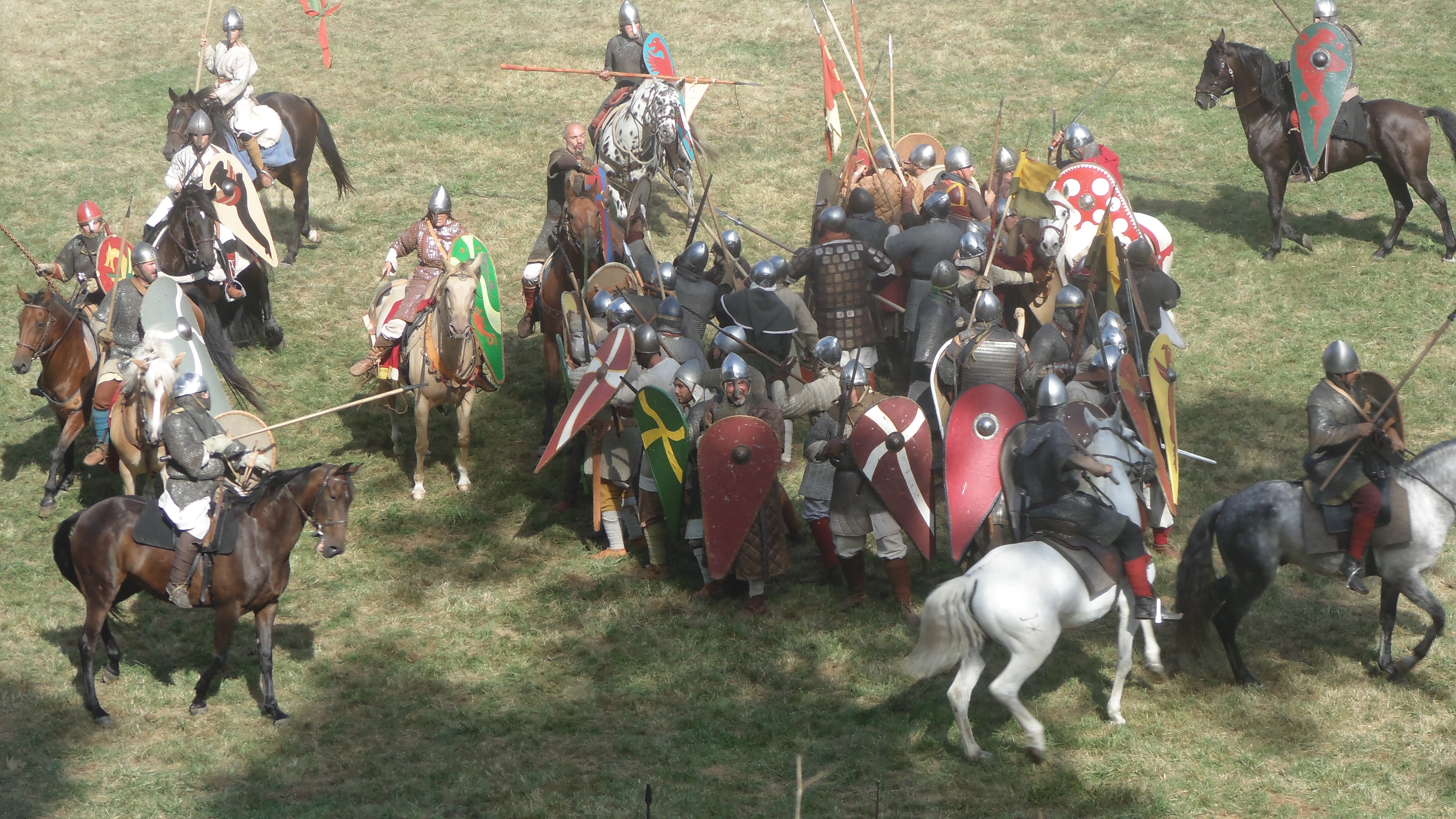 Infanterie et cavalerie normandes à Falaise (xi siècle)